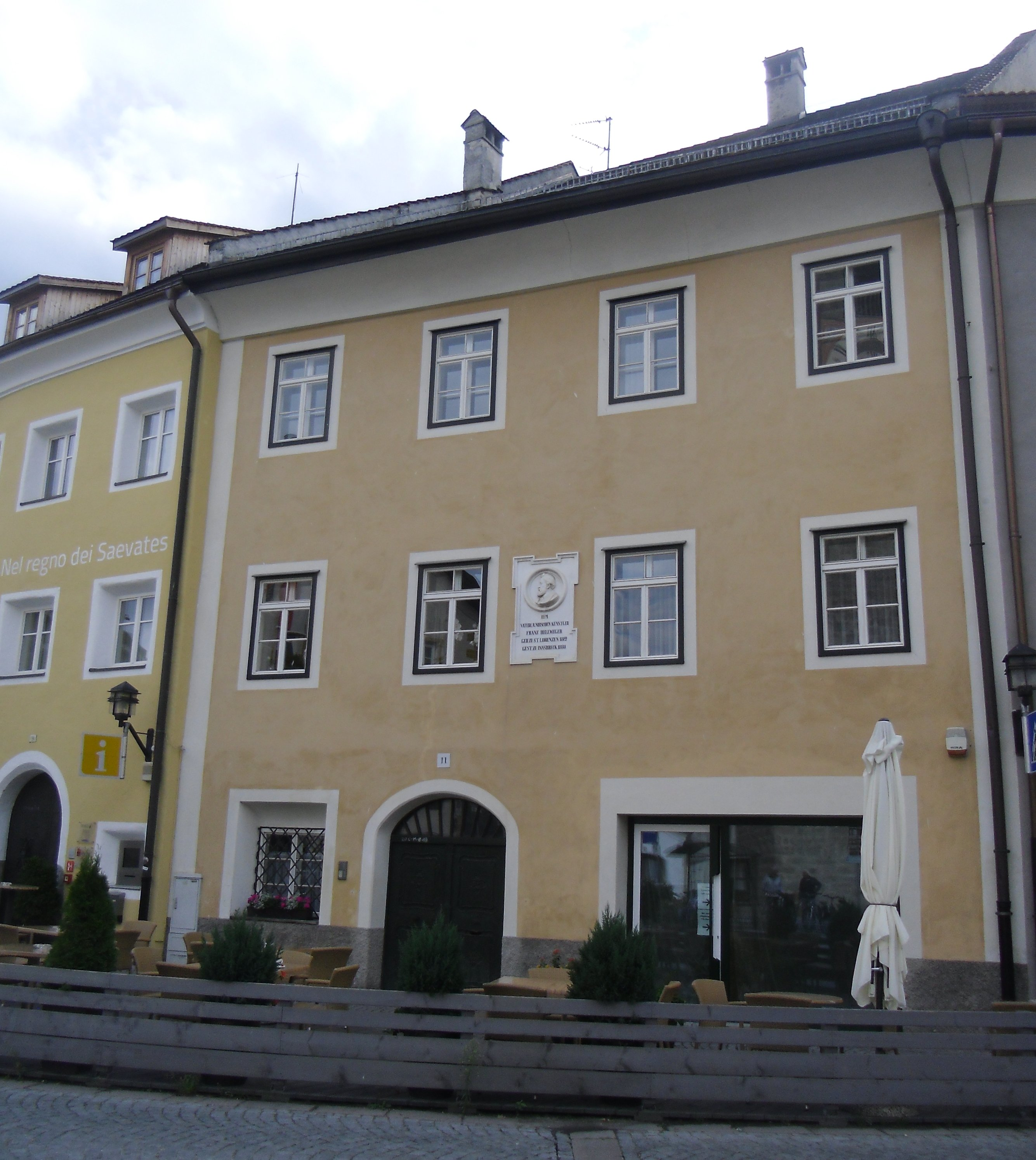 Hellweger in St. Lorenzen (Südtirol)